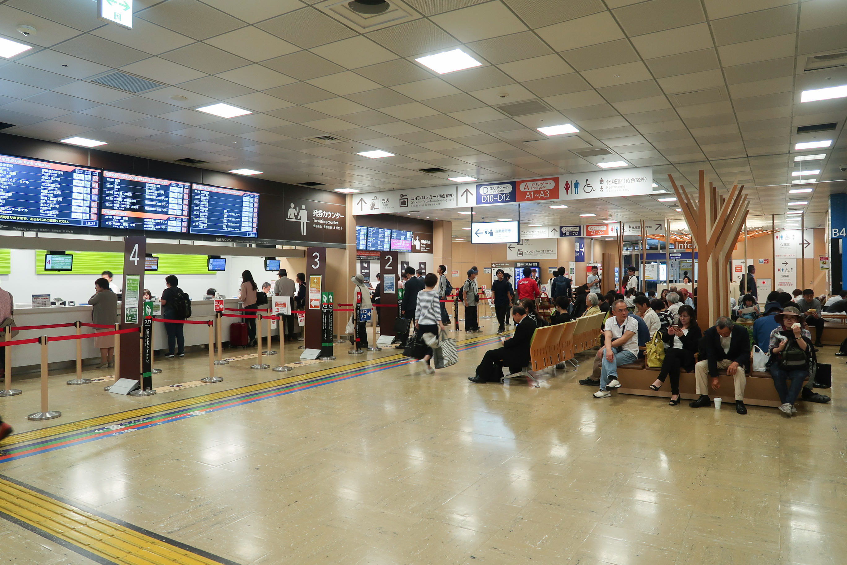 Shinjuku Express Bus Terminal